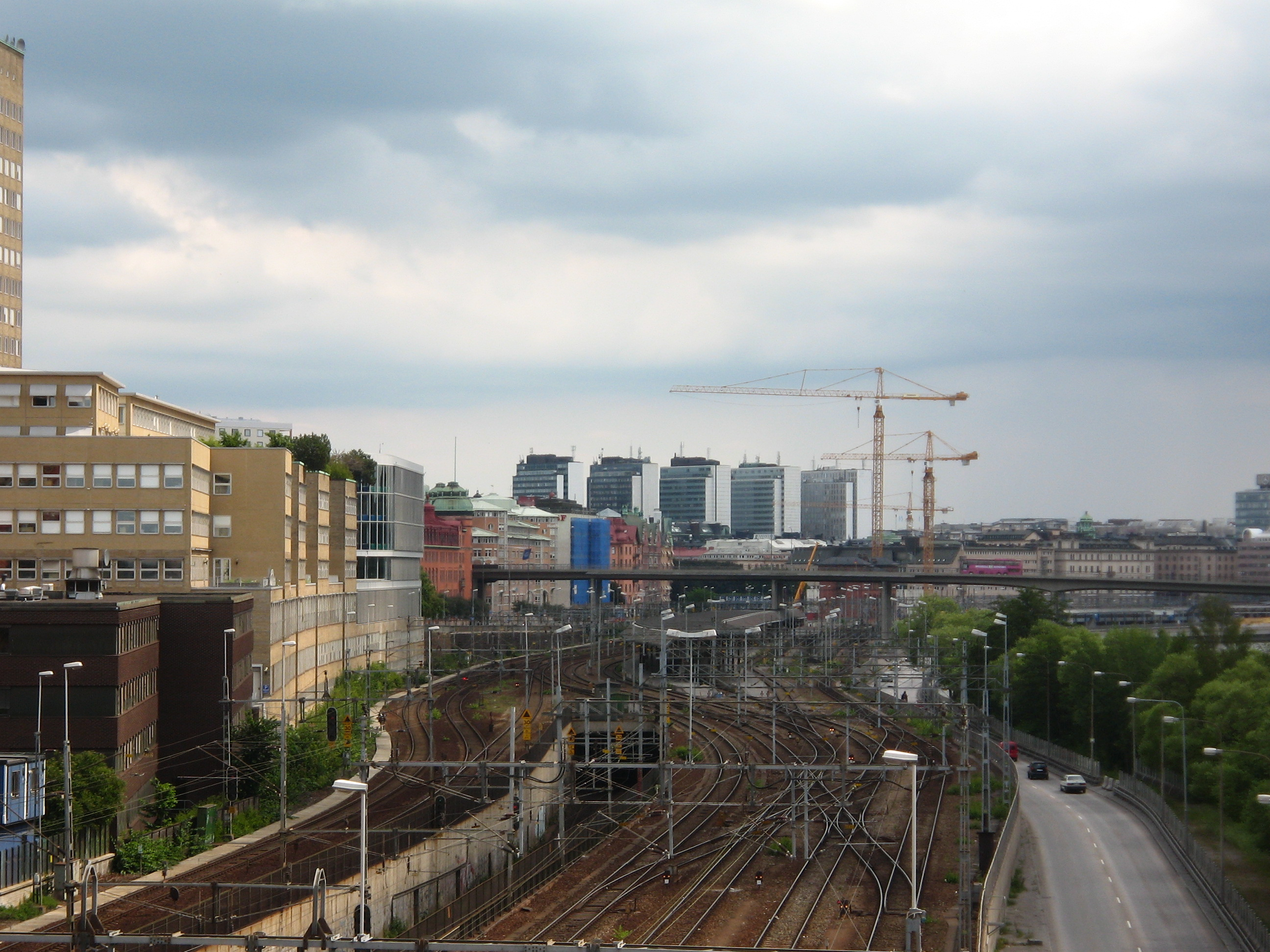 Hötorgsskraporna sett från Sankteriksbron